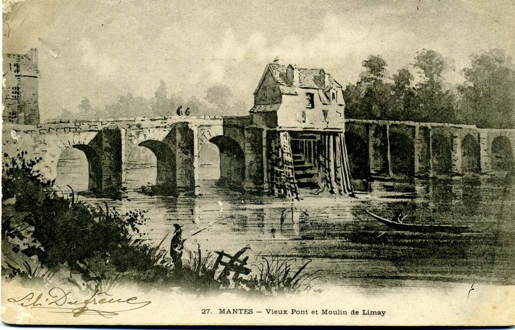 Pont de Limay au XIXe siècle Carte postale ancienne (postée en 1903)